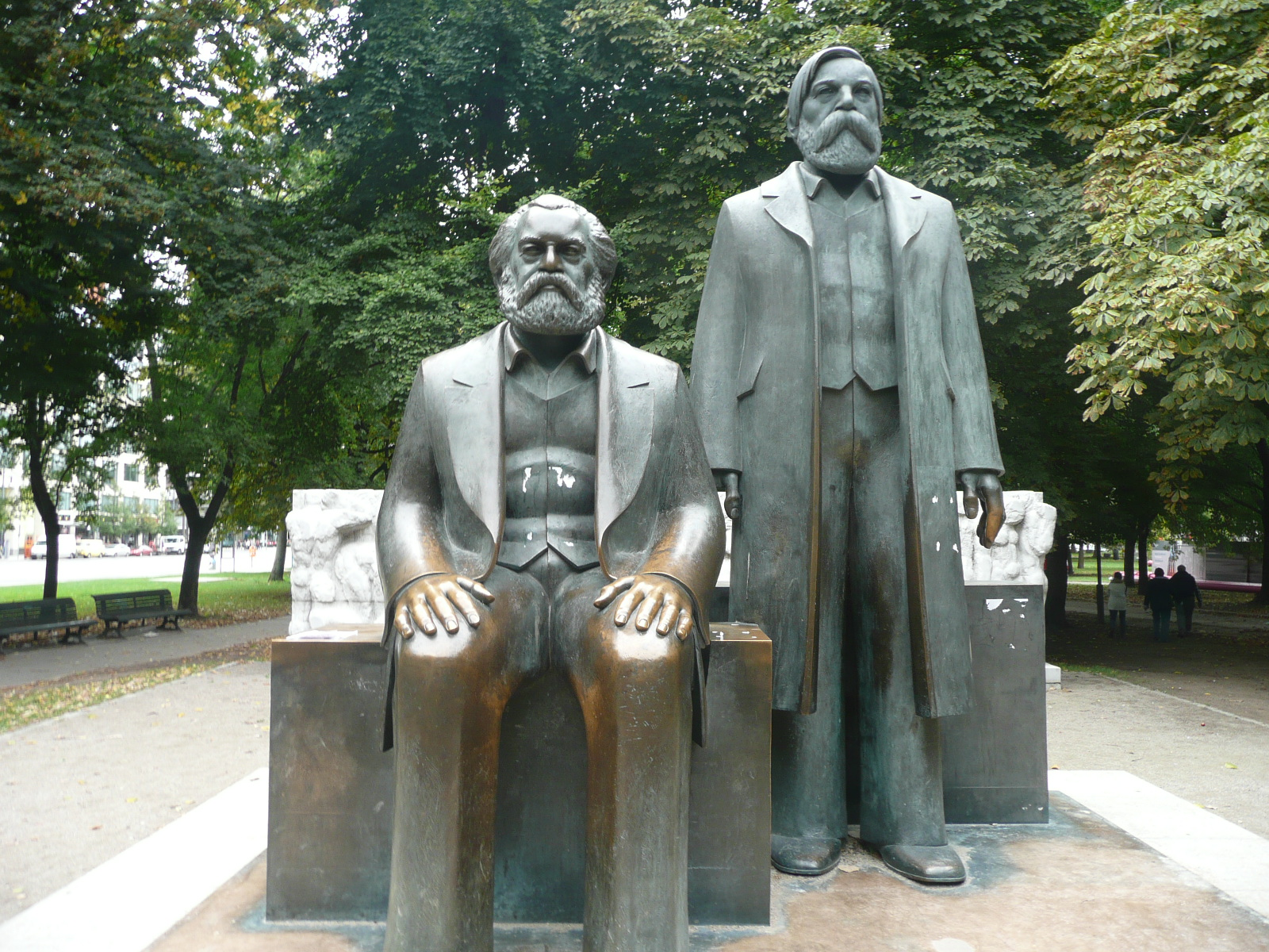 Marx-Engels-Forum, Berlin